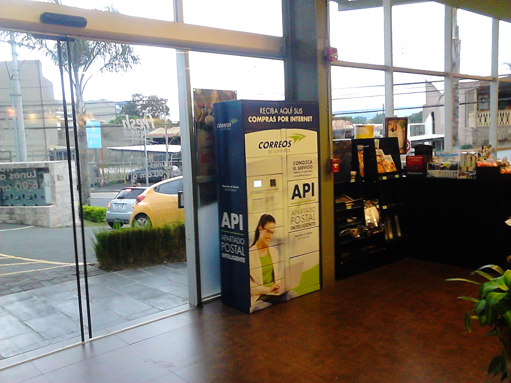 Apartado Postal Inteligente instalado en un supermercado.